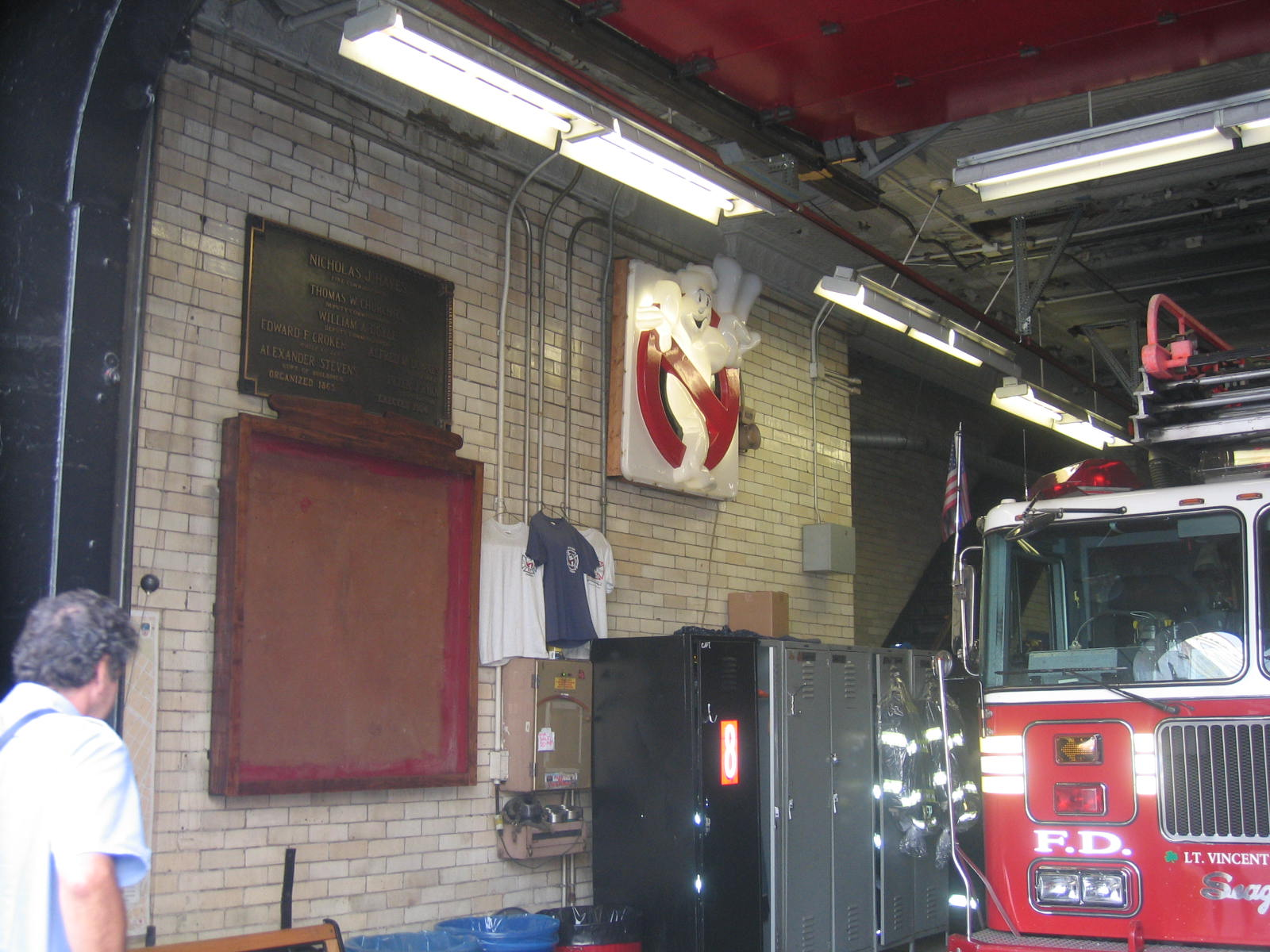 Caserne des pompiers a New York ou fut tourné SOS Fantômes.